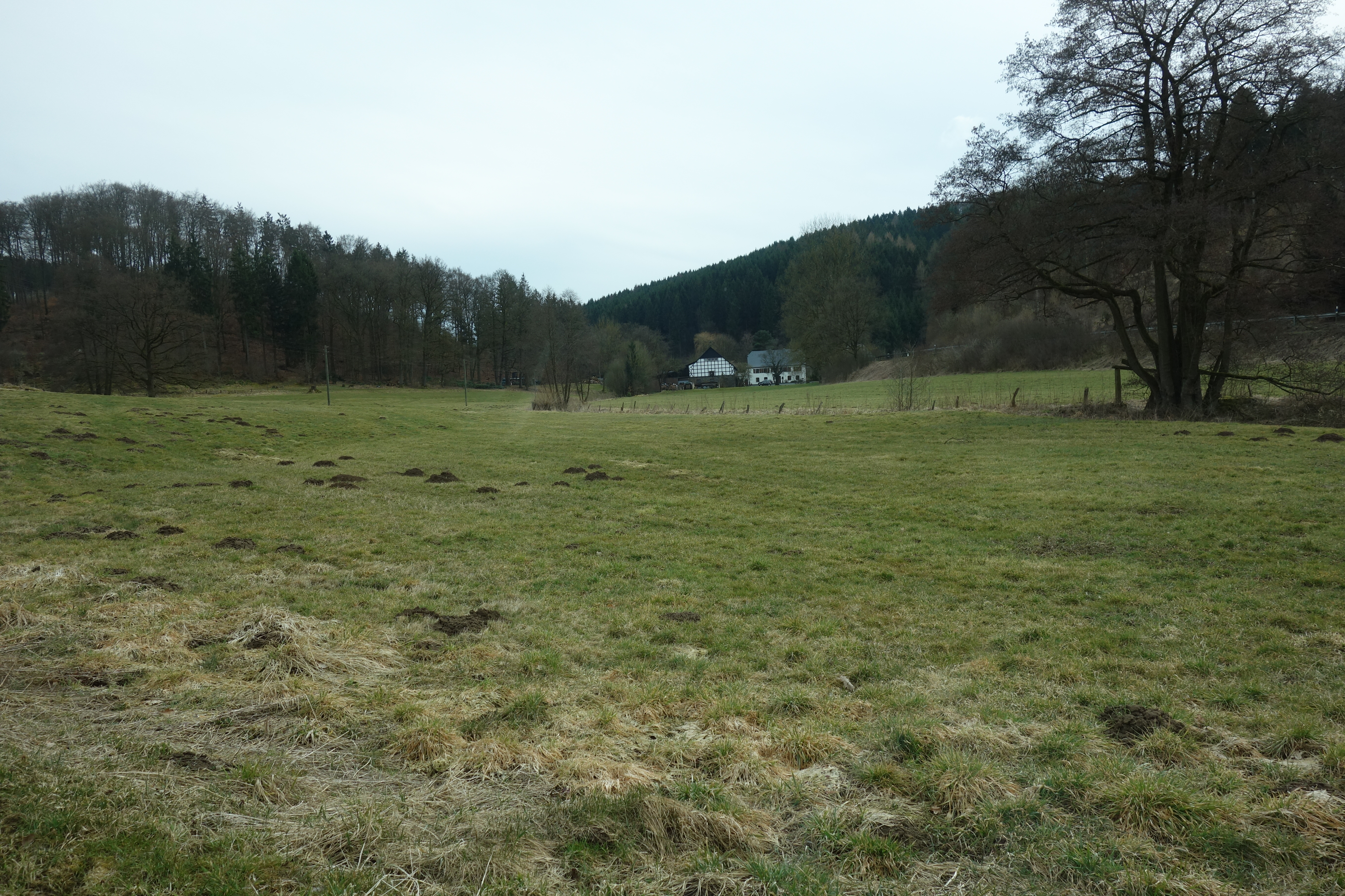 Landschaftsschutzgebiet Esselbach zwischen Cobbenrode und Bremscheid; Blick Richtung Blockheim; Wald gehört zum LSG Eslohe.